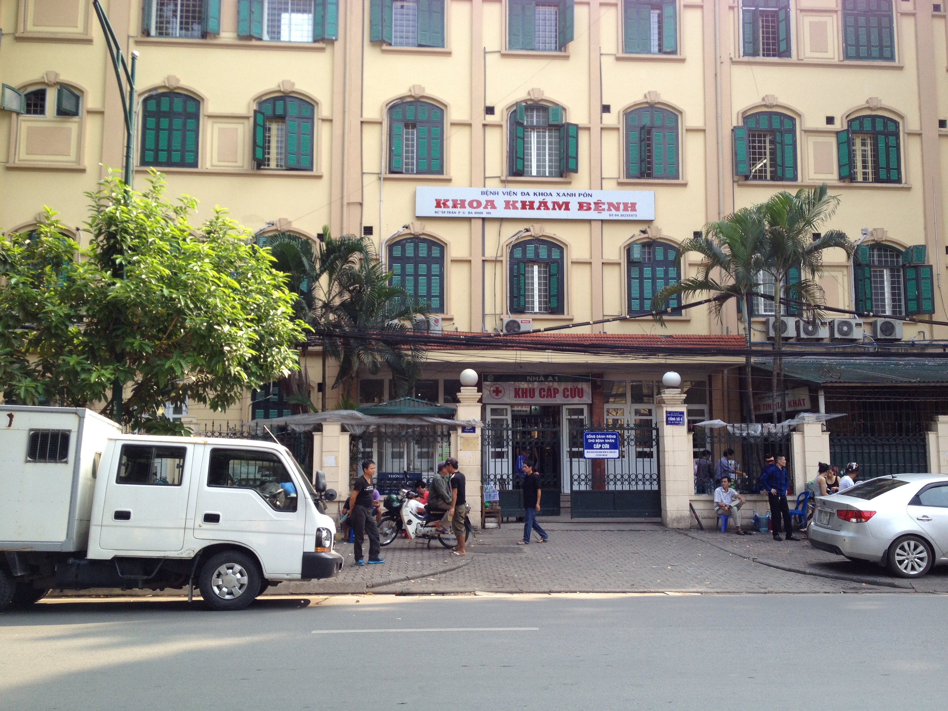 Hà Nội, Việt Nam.